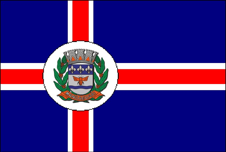 Bandeira do Município de Mandaguari